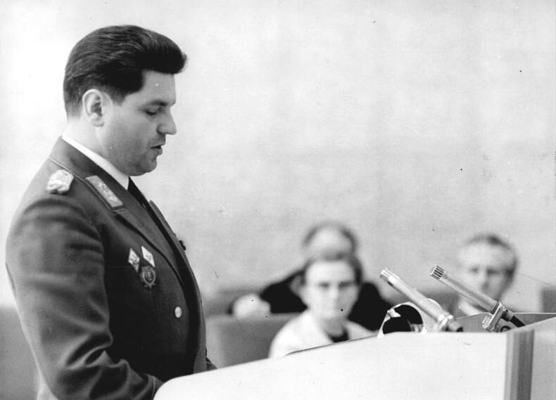 Zentralbild Koard-16.5.1969 Berlin: Bedeutsame 17. Sitzung des Staatsrates der DDR im Amtssitz am Marx-Engels-Platz. Im Amtssitz des Staatsrates am Marx-Engels-Platz: Generalmajor Horst Skerra sprach in der Diskussion über die Erziehung zur sozialistischen Menschengemeinschaft in der NVA.